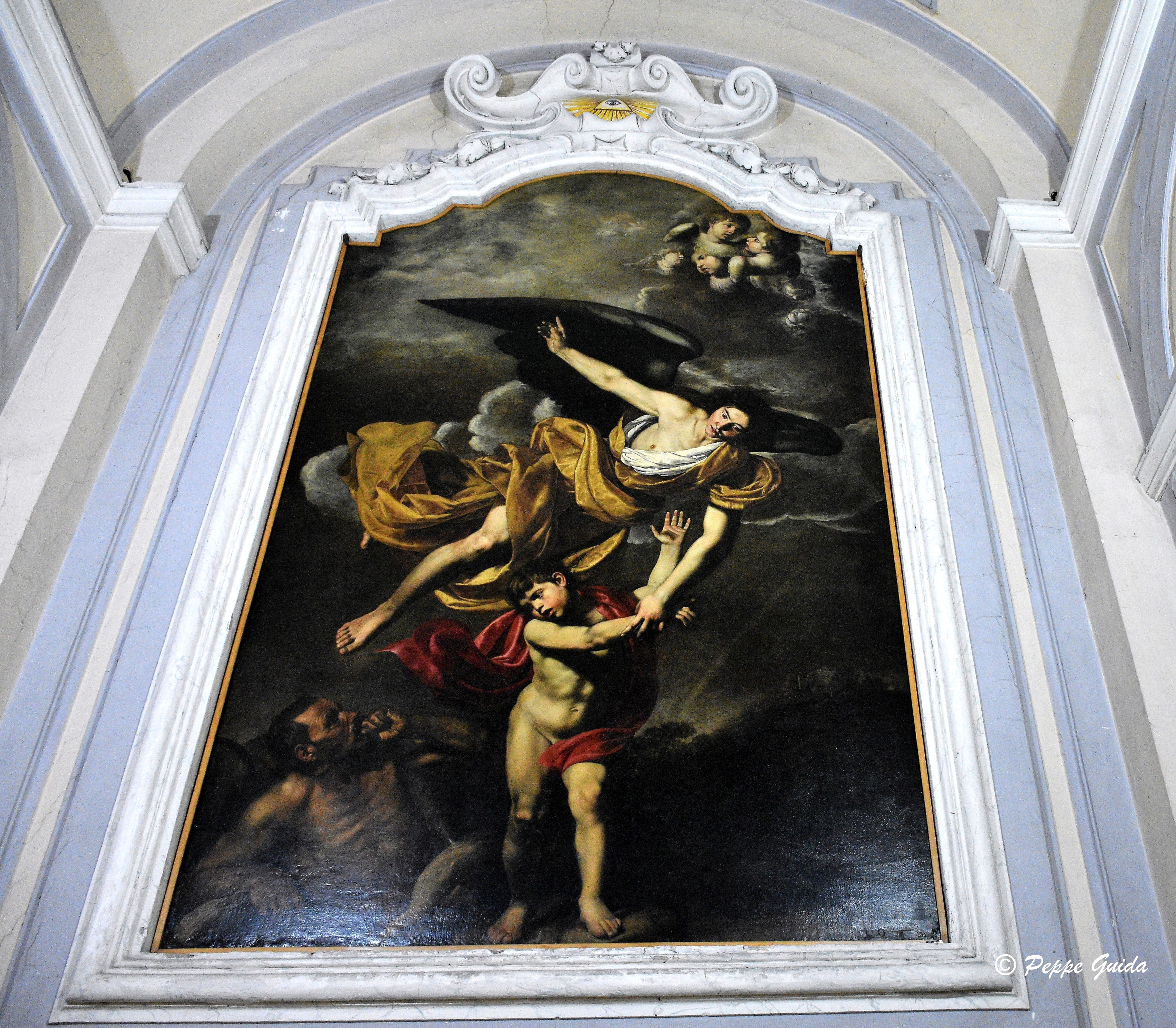 Chiesa della Pietà dei Turchini.